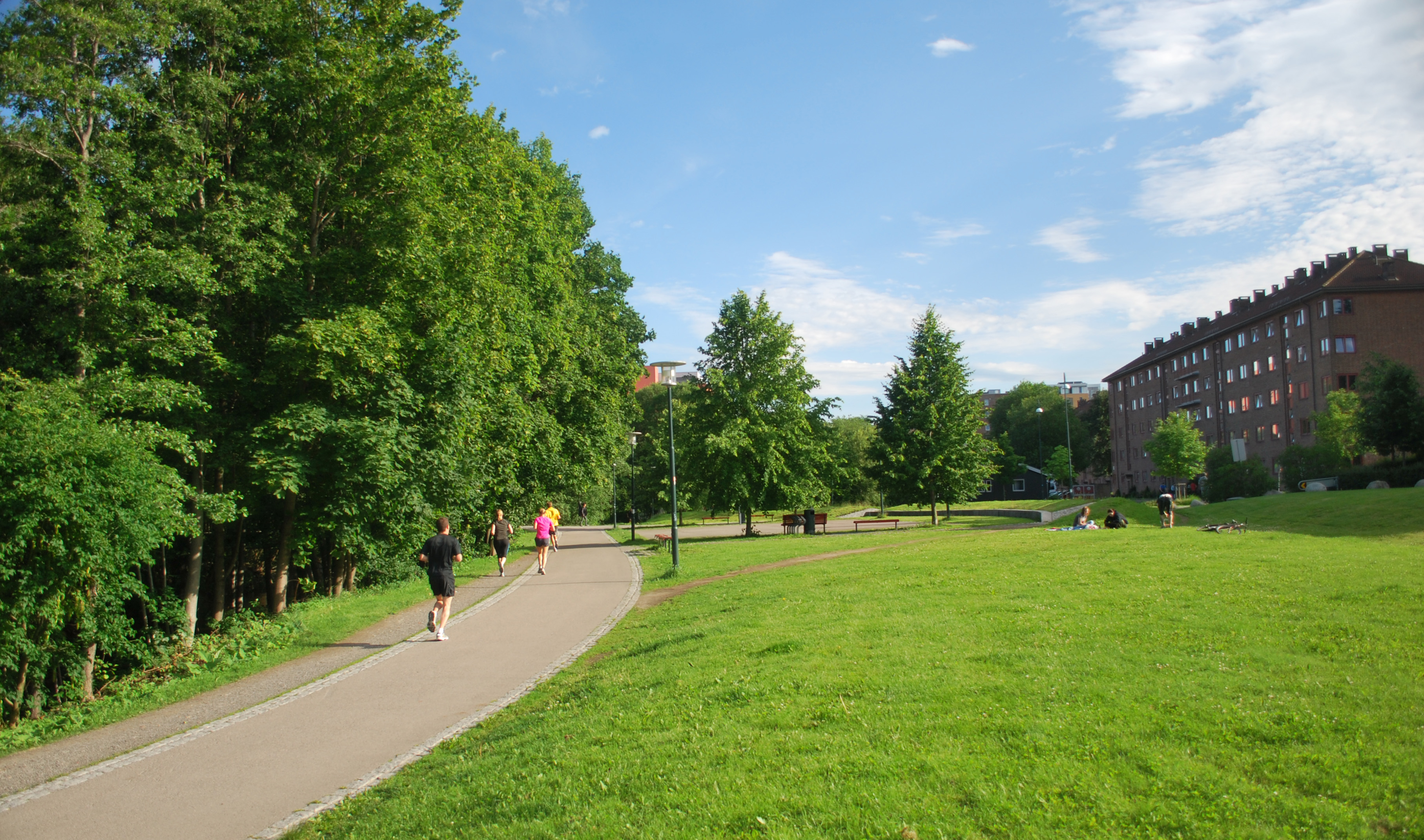 Turvei B10 langs Badebakken, Bjølsen, med Akerselva til venstre